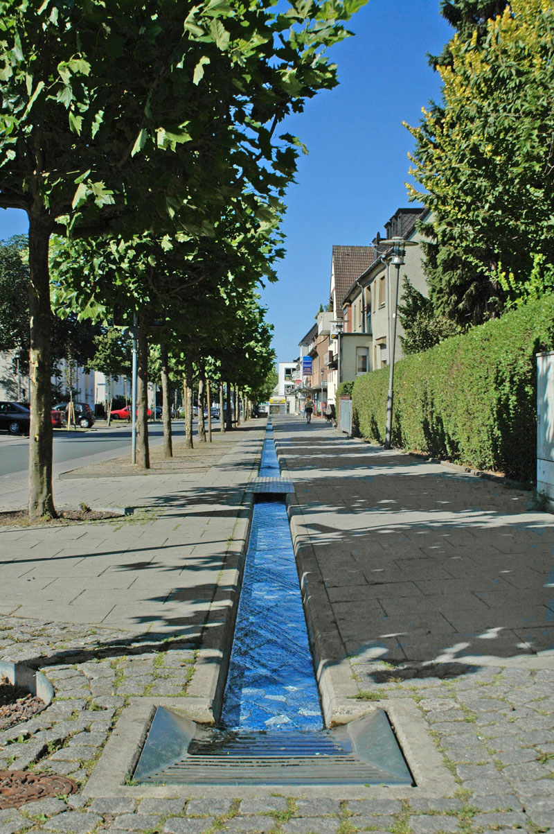 Germany Bergkamen "Blaues Band"